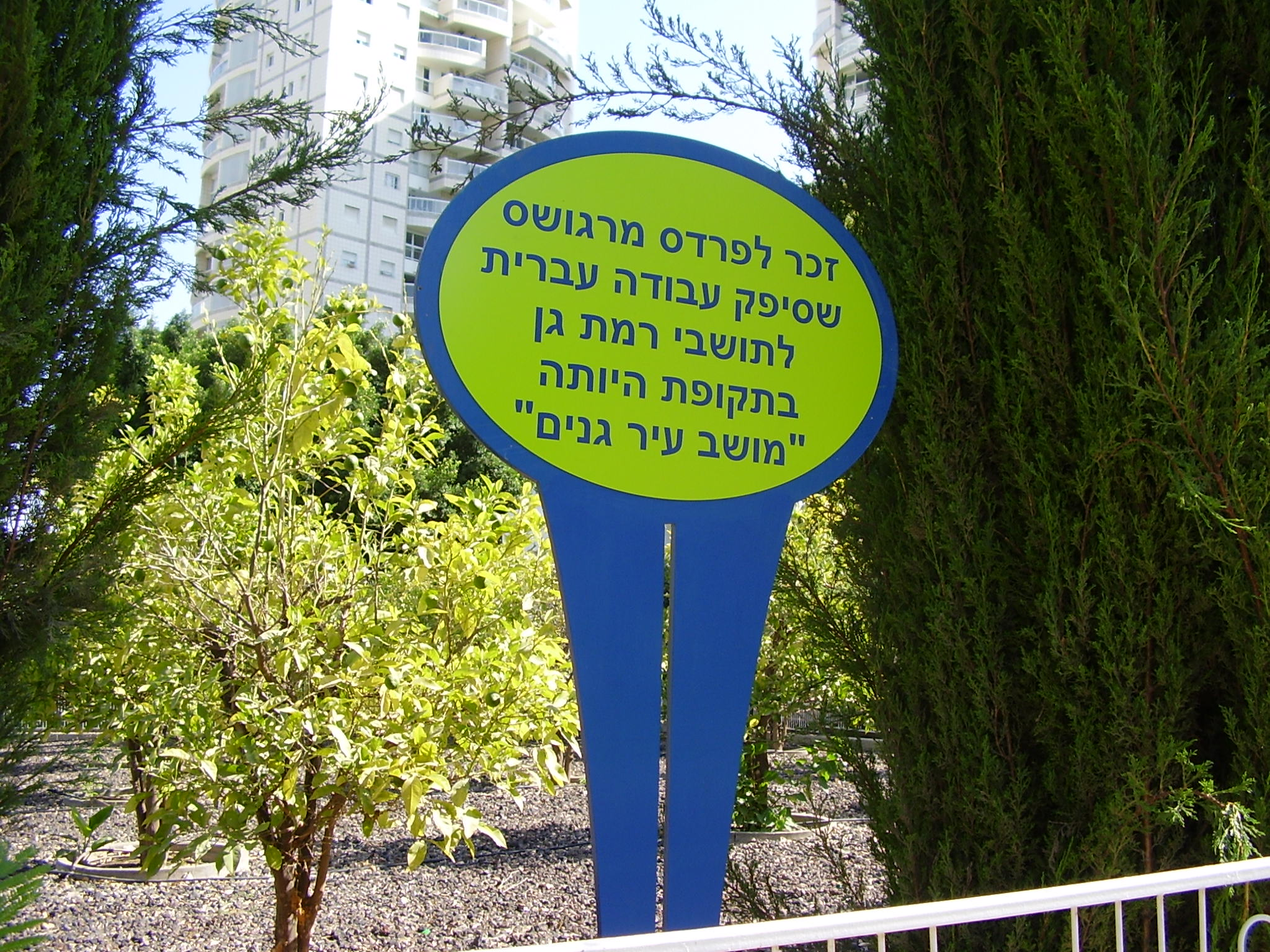 park in ramat -gan, israel